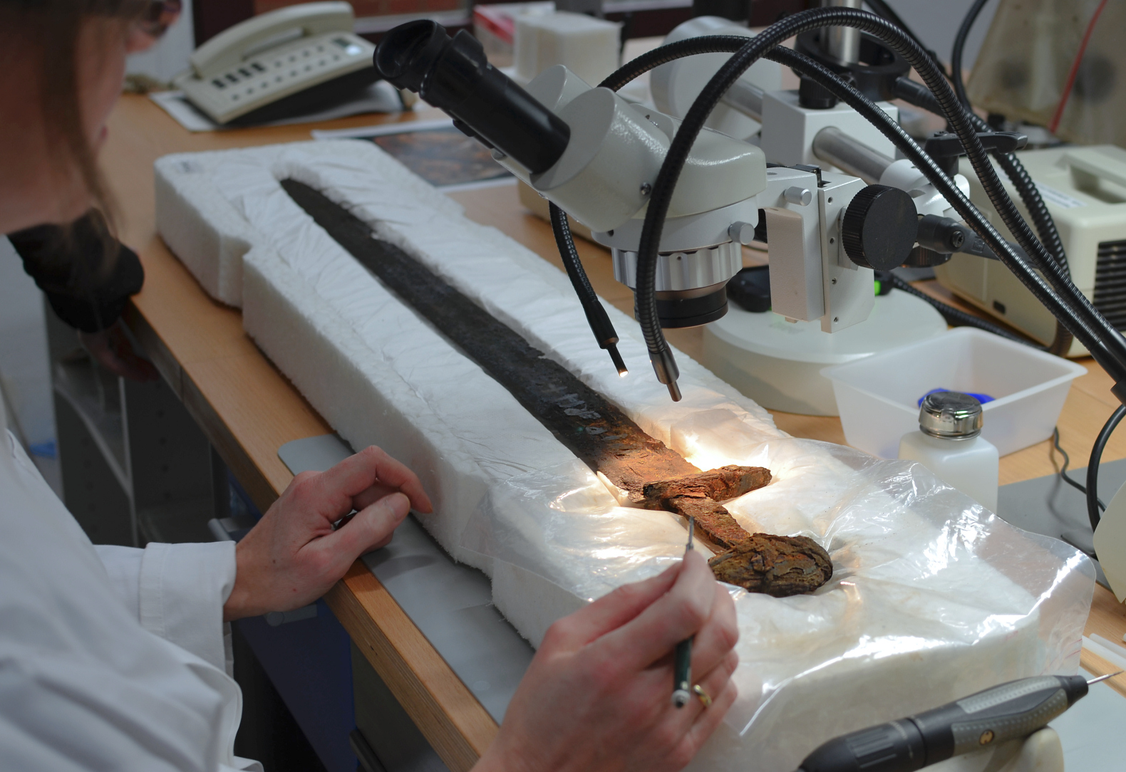 Freilegung des Schwertes von Großenwieden in den archäologischen Restaurierungswerkstätten des Niedersächsischen Landesamtes für Denkmalpflege, Schriftzug Ulfberth teilweise erkennbar